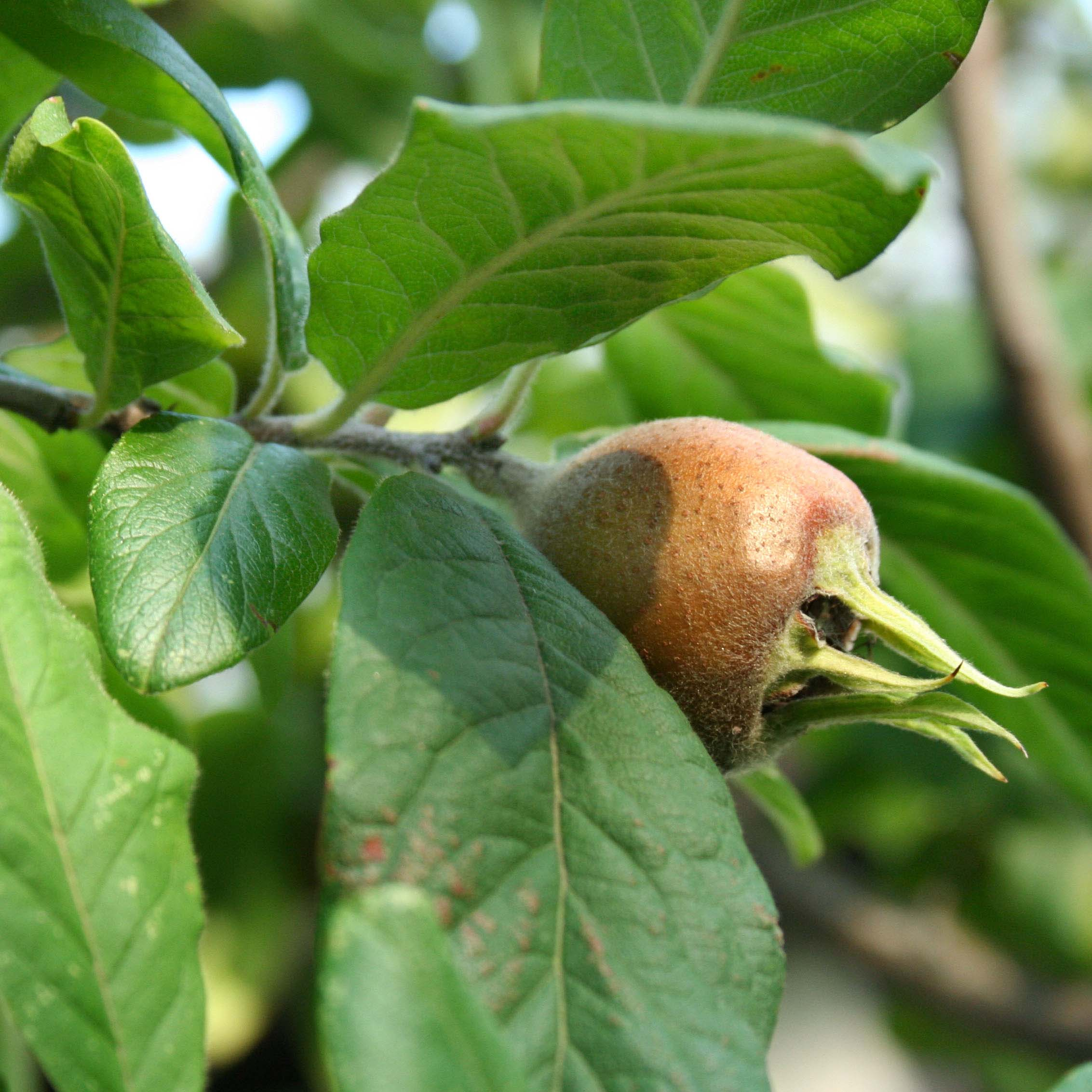 Naspolya augusztusban (Pestszentlőrinc)